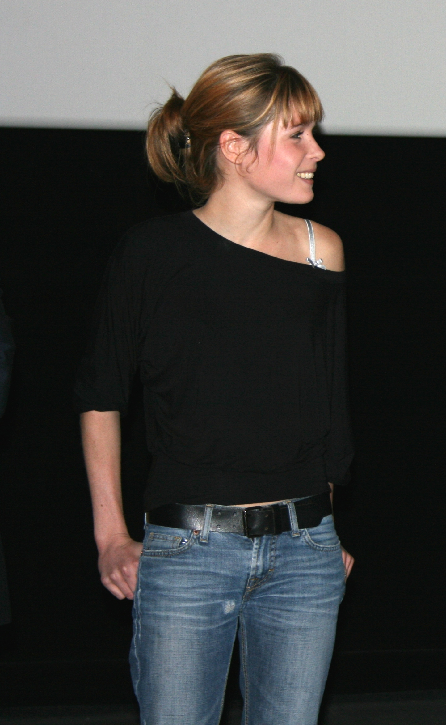 Élodie Bollée à l'avant-première de Didine diffusée à l'UGC Ciné Cité Les Halles, à Paris.